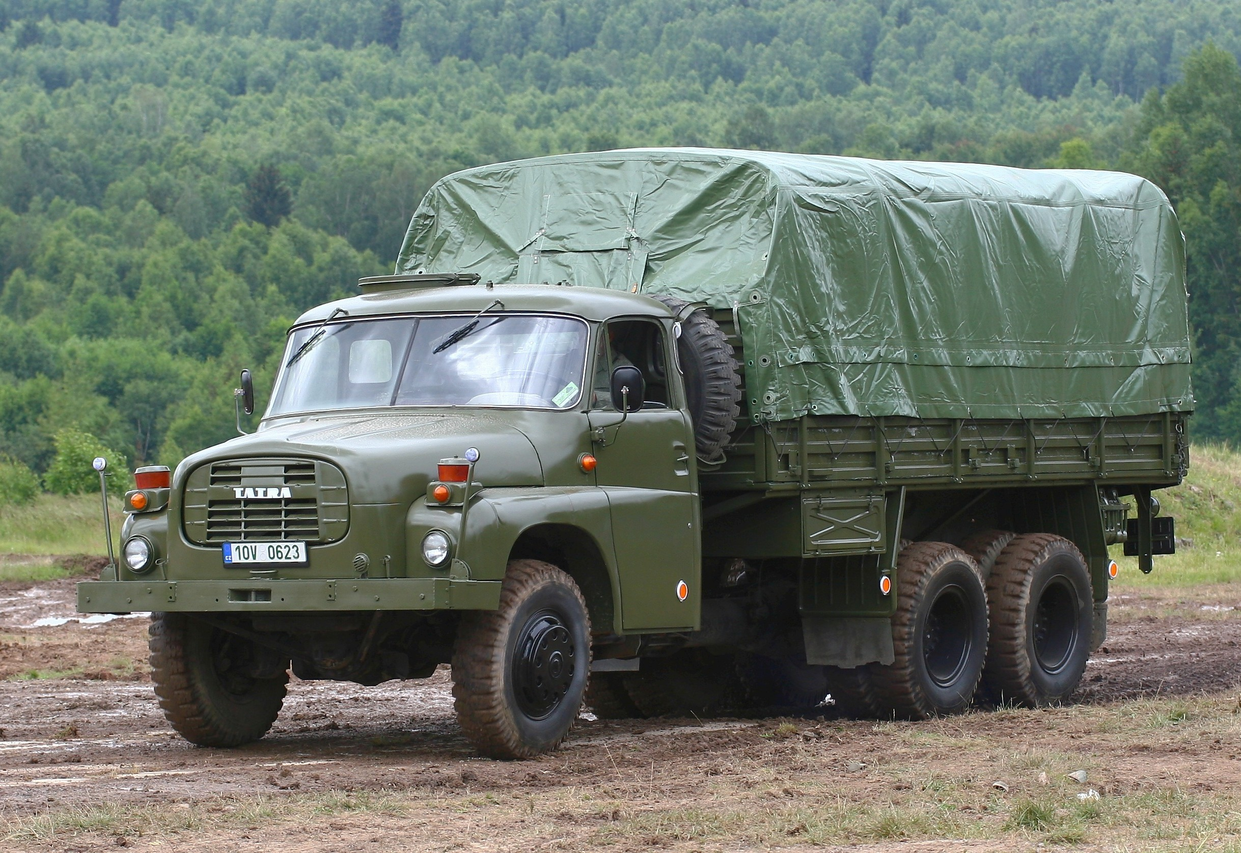 Vojenská technika zaznamenaná při dynamických ukázkách na Dni pozemního vojska BAHNA 2018, který pořádá Velitel společných sil a Nadace pozemního vojska AČR.